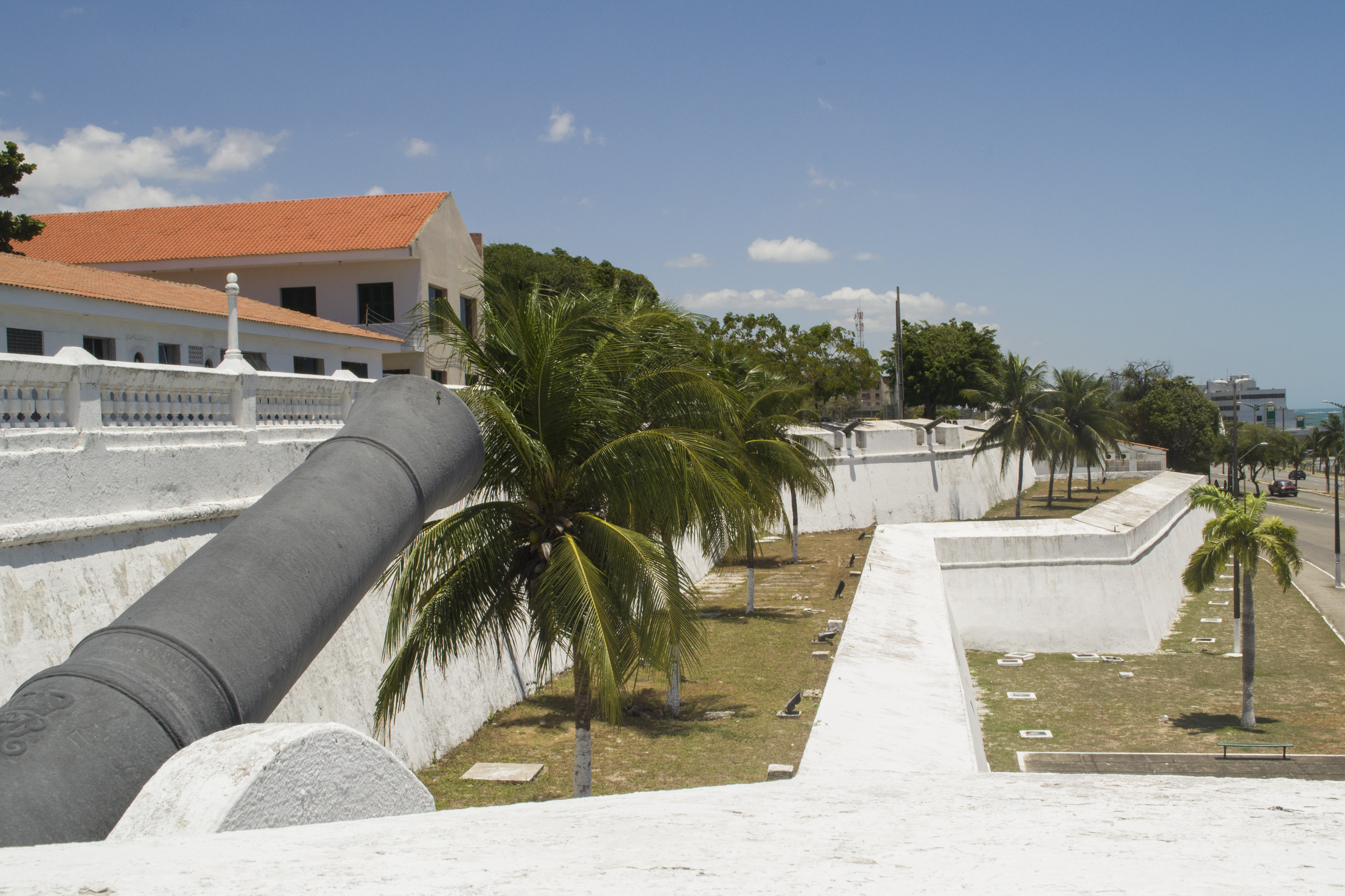 Conjunto Constituído pela Fortaleza de Nossa Senhora da Assunção, com o Material de Artilharia Composto pelos Canhões de n. 01 a 06, e pelo Antigo Quartel da Guarnição do Ceará, Atual Quartel da 10ª RM - Foto do canhão numero 2, tirada na terça-feira dia 15/09/2015 às 11:20h, entrada permitida apenas com a companhia do guia da instituição.